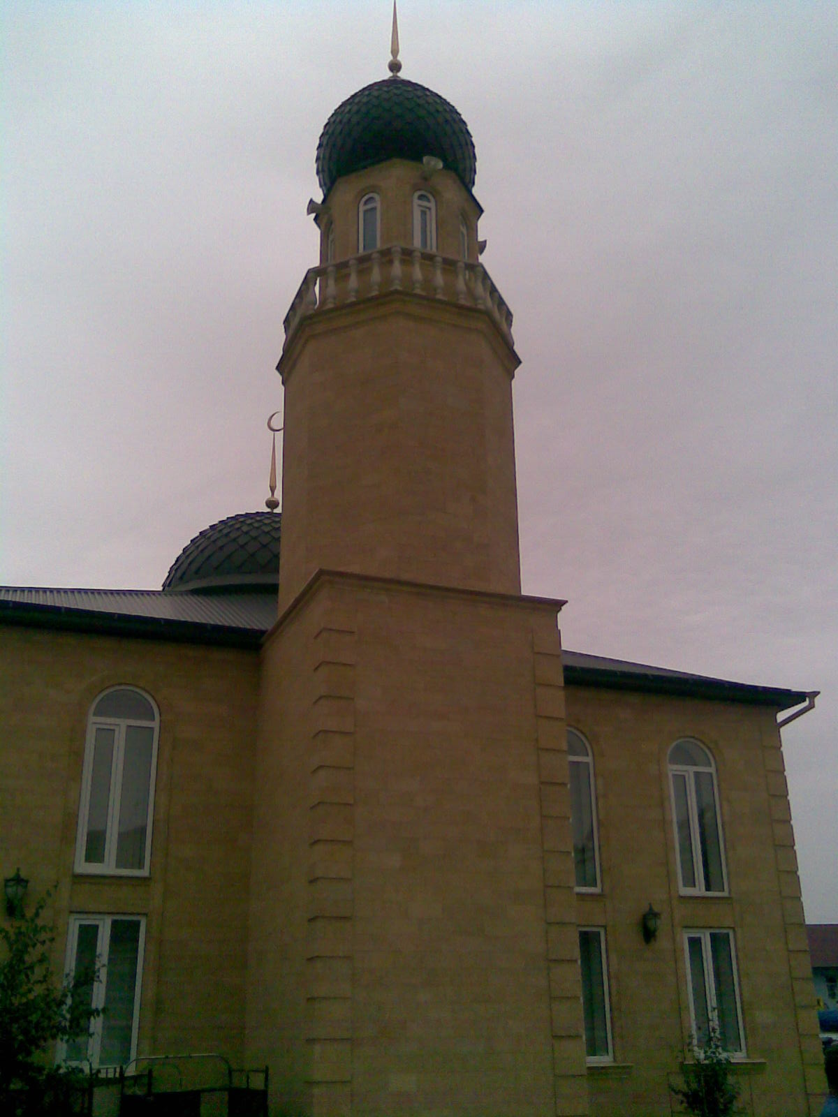 Мечеть в Хасавюрте